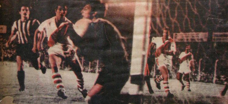 Imagen de un encuentro amistoso entre Rosario Central y River Plate en 1971. Norberto Menutti (RC) embolsa el balón.